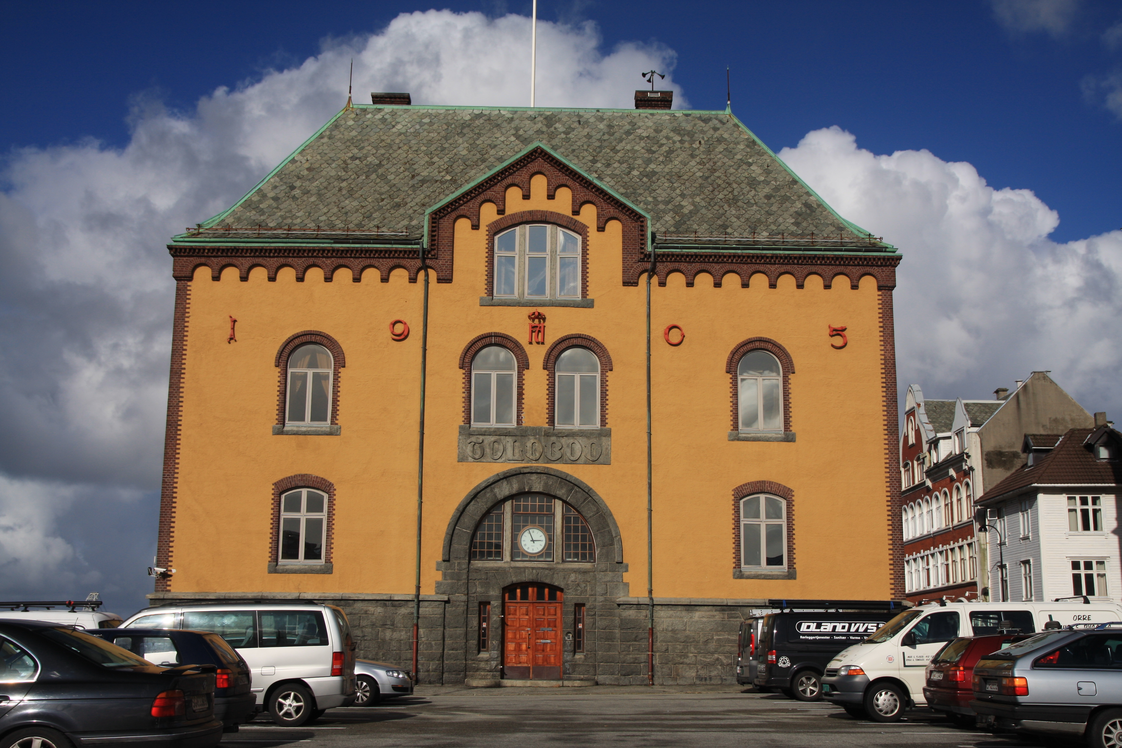 Stavanger tollsted